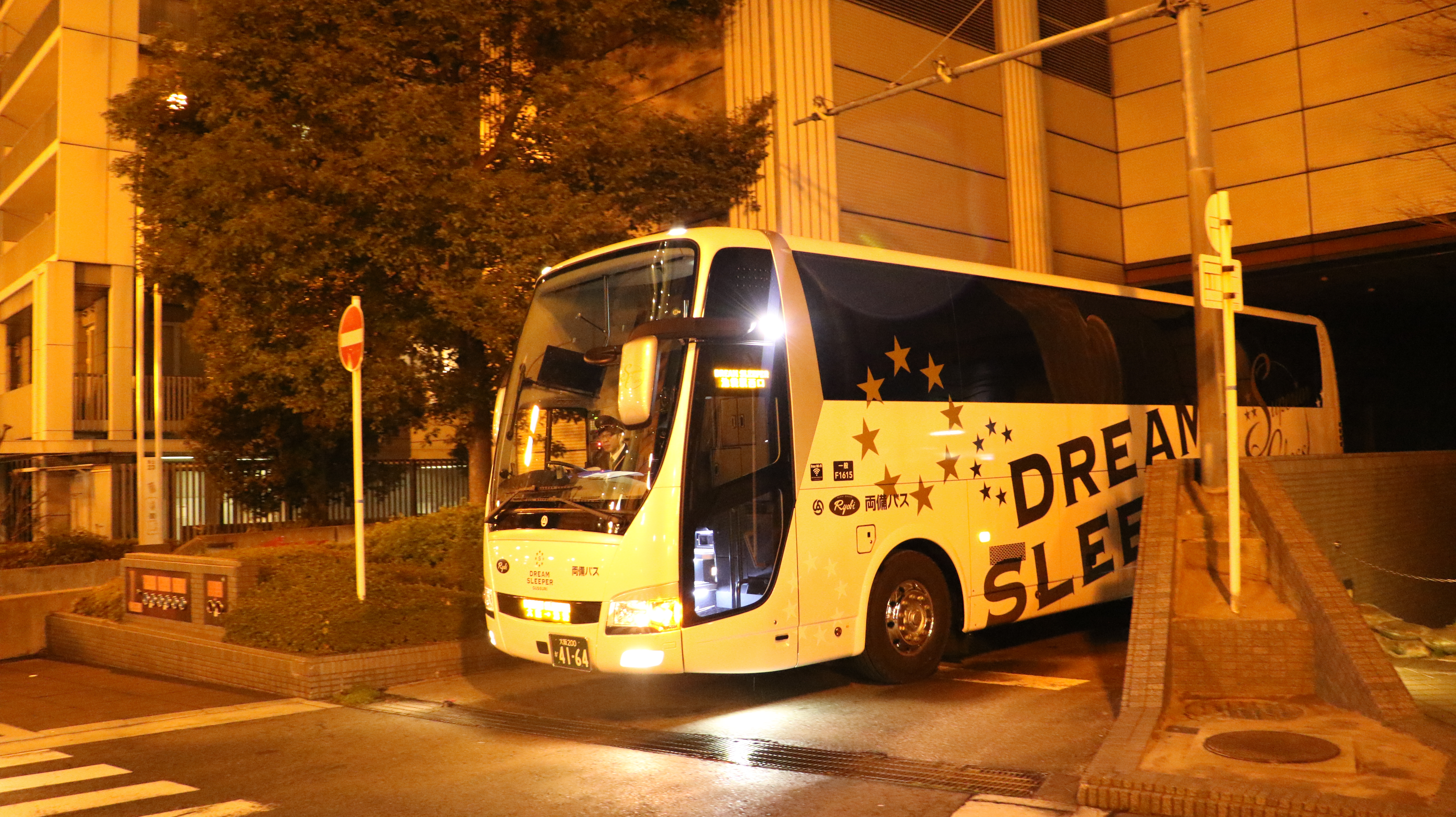 ドリームスリーパーⅡ 大阪（門真車庫・ＯＣＡＴ）⇒池袋駅 両備バス